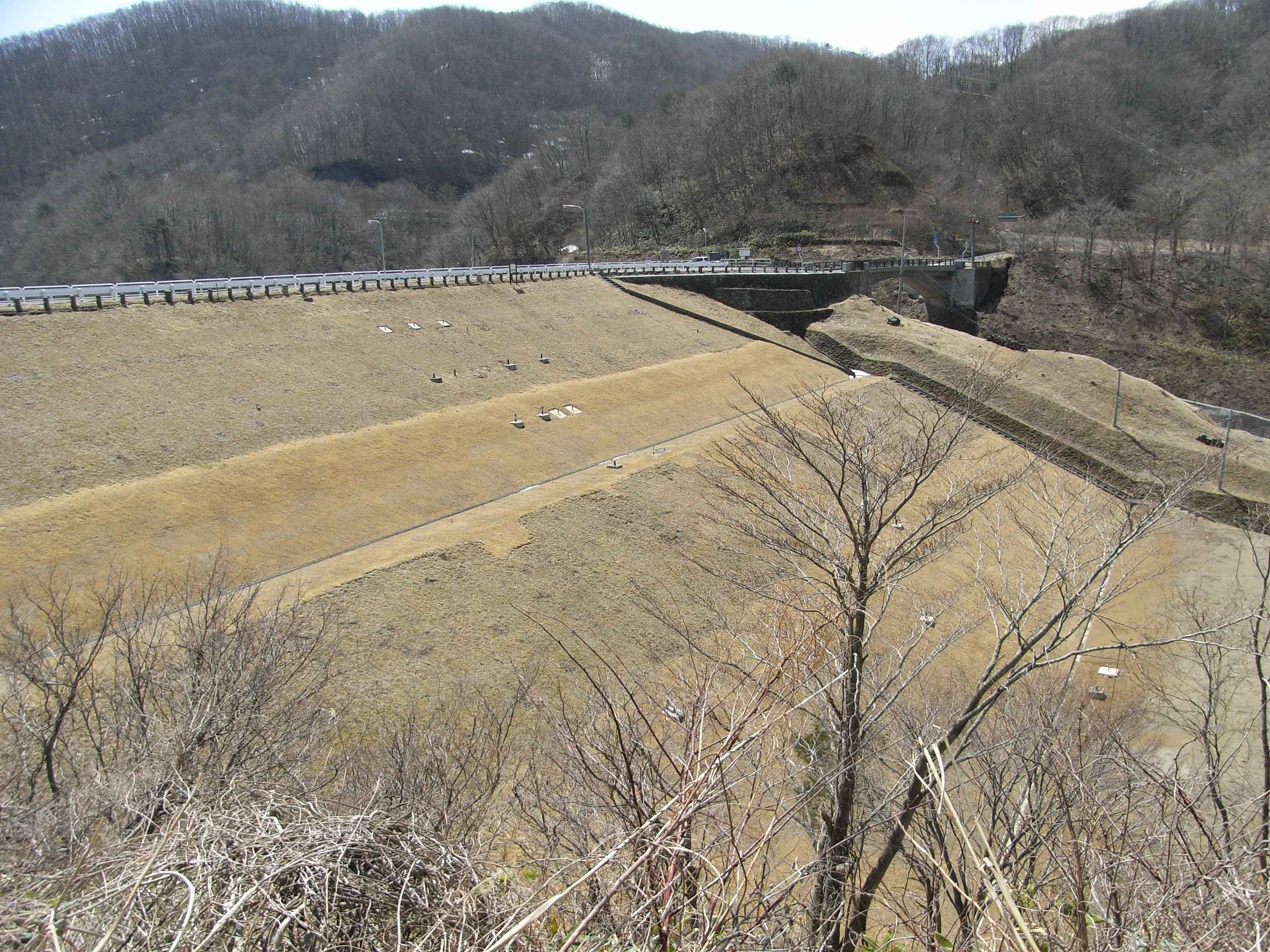 Dam